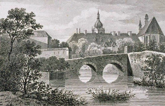 Vue de Colmar, département du Haut-Rhin. Bibliothèque nationale et universitaire de Strasbourg